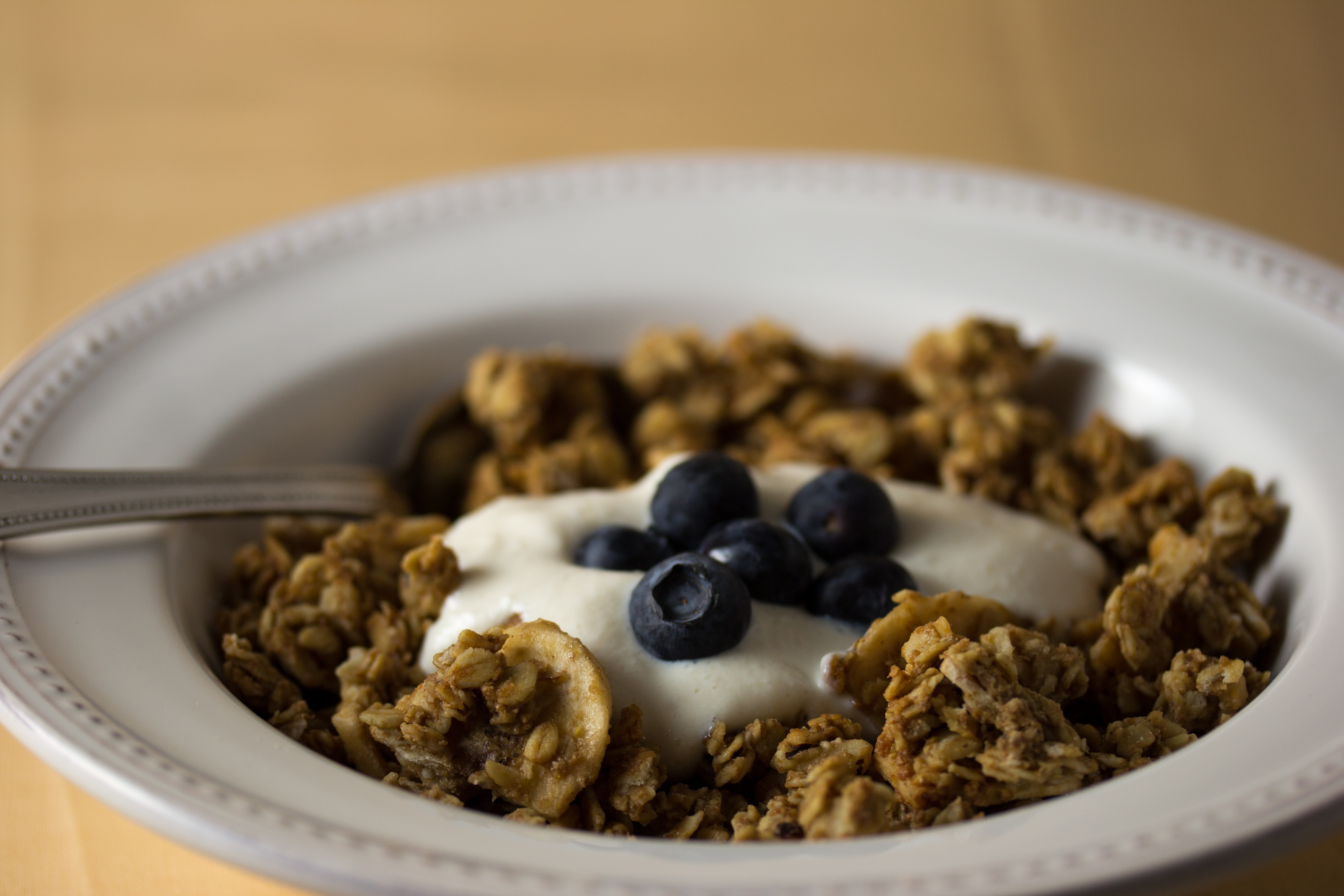 Banana Walnut Granola